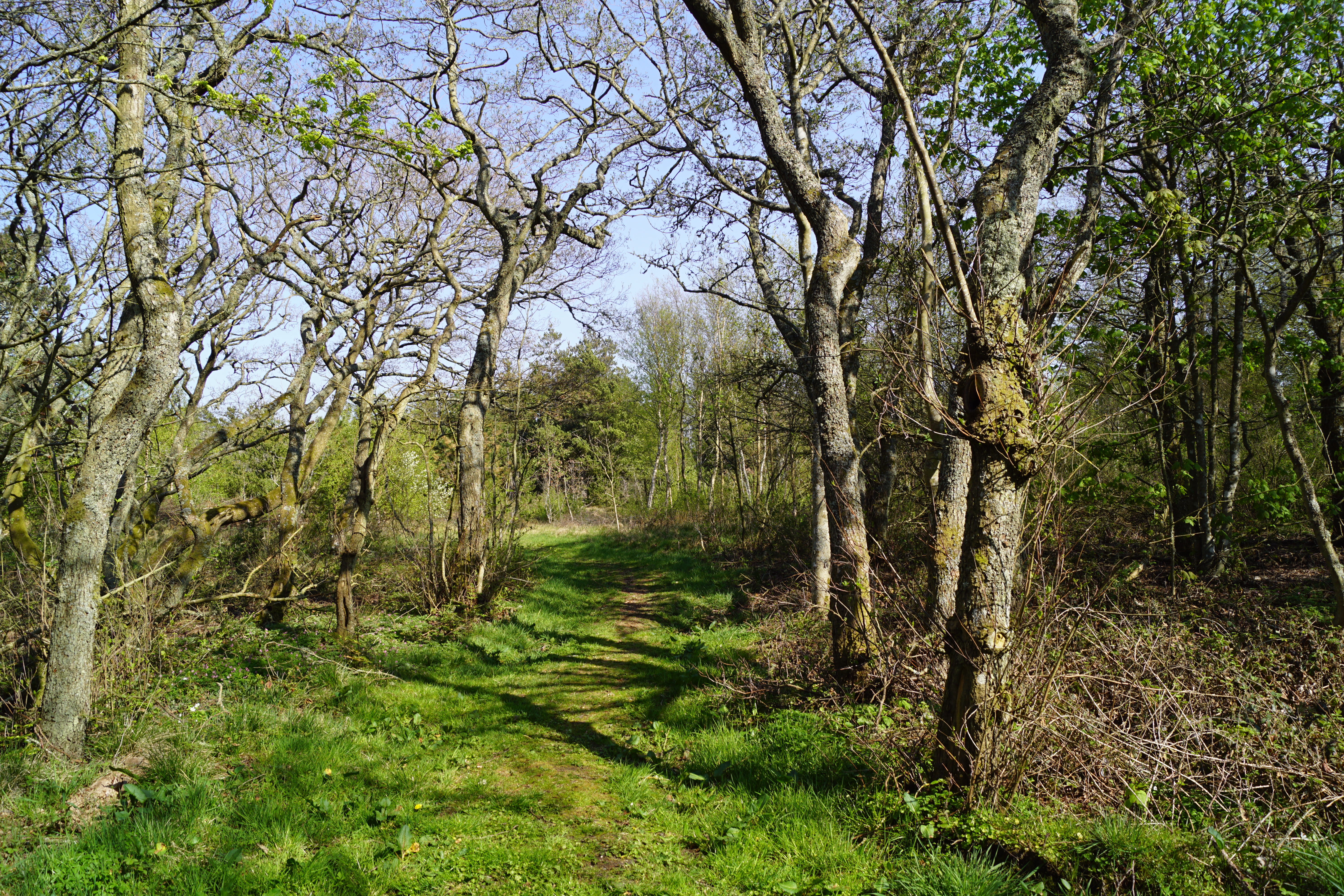 Lodbjerg Klitplantage nær Lodbjerg Fyr, set mod øst